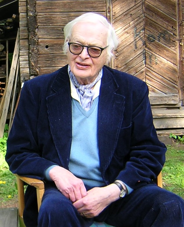 Formgivaren Nisse Strinning (String-hyllan)